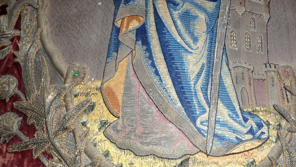 Binnen Begijnhofkerk Sint-Jan Baptist